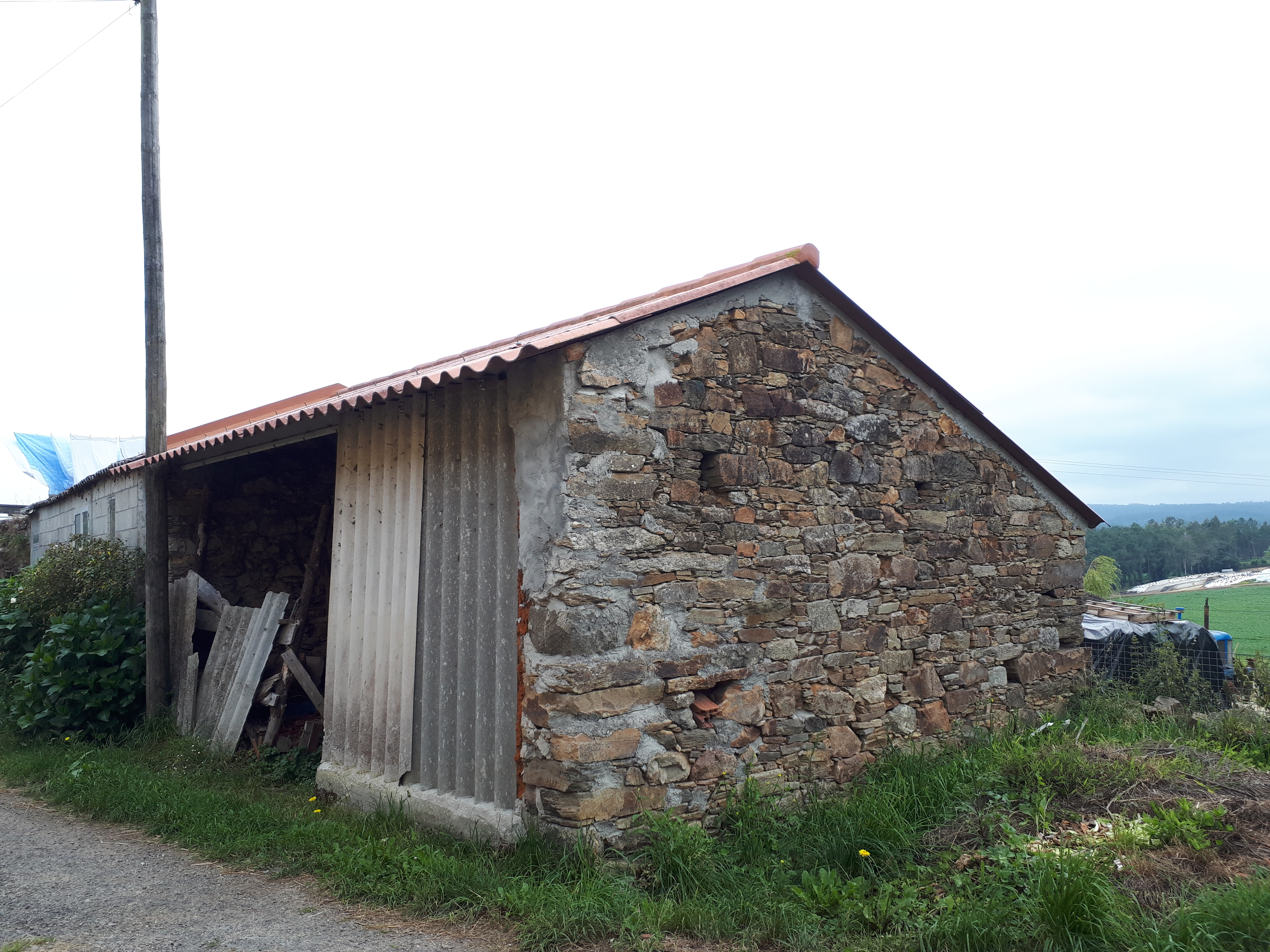 Leonarda de Tallo, primeira regueifeira galega vivía nunha casoupa en Tallo. Agora alboio de leña e ferramentas.